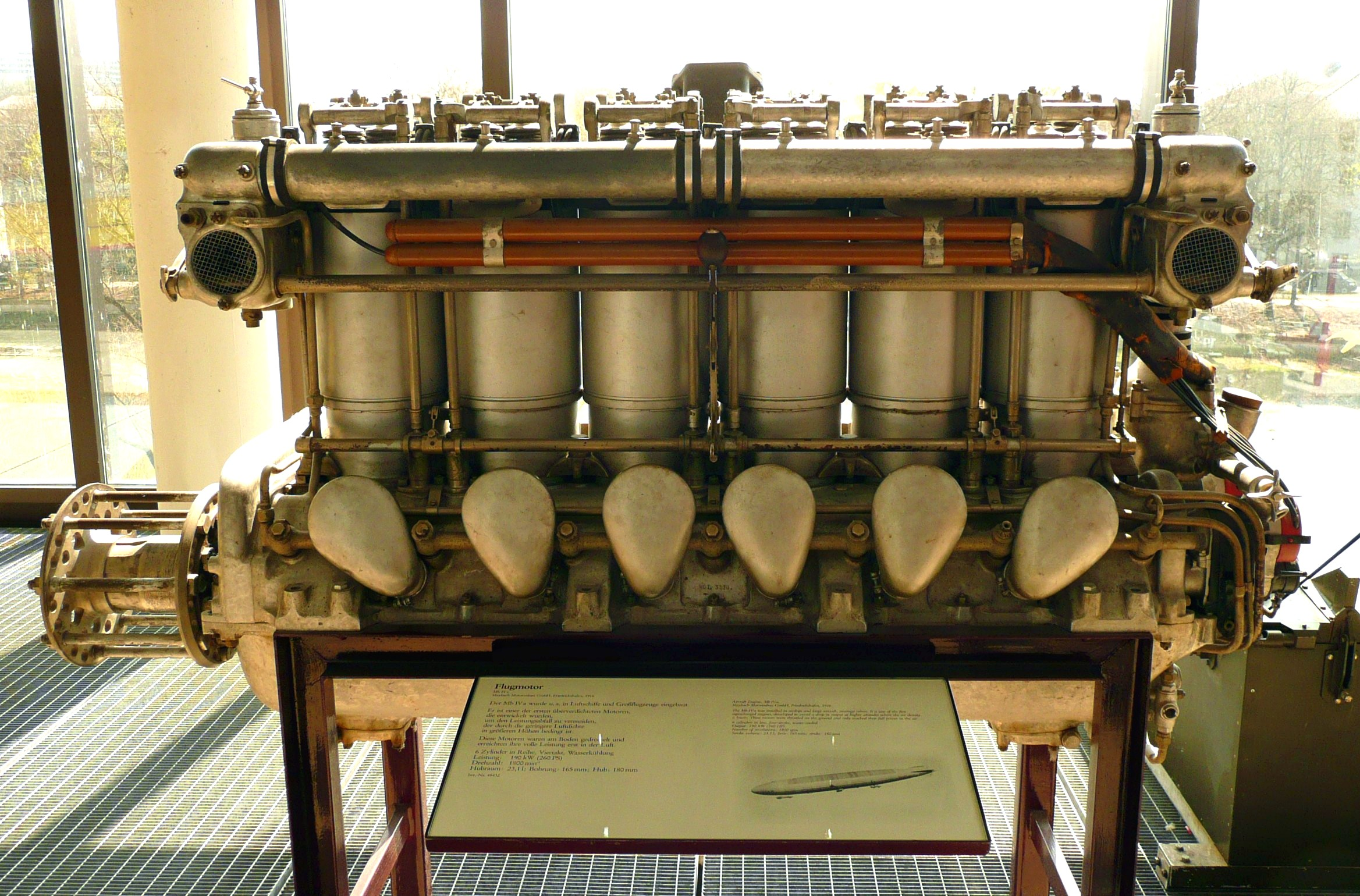 Flugmotor für Luftschiffe und Großflugzeuge der Maybach Motorenbau GmbH aus Friedrichshafen. Baujahr 1916. Wassergekühlter 6 Zylinder Reihenmotor mit 260 PS. Erster überverdichtender Motor für große Höhen. Ausgestellt im Deutschen Museum München